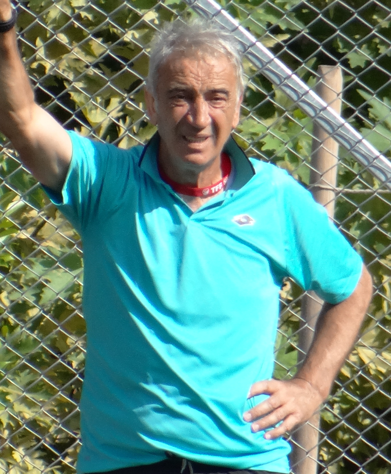 Kenan Serdar Gücüyener